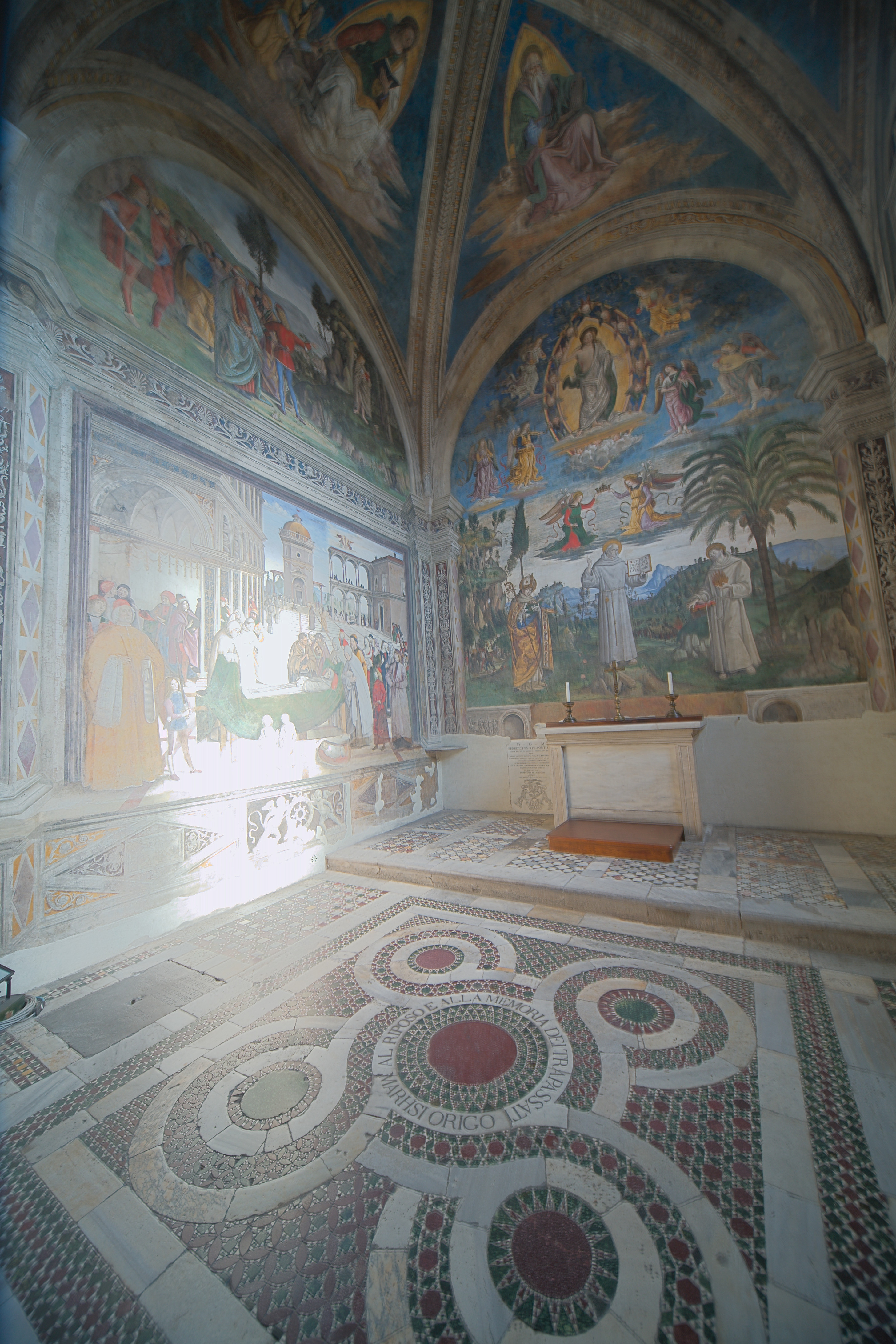 Santa Maria in Aracoeli chapel